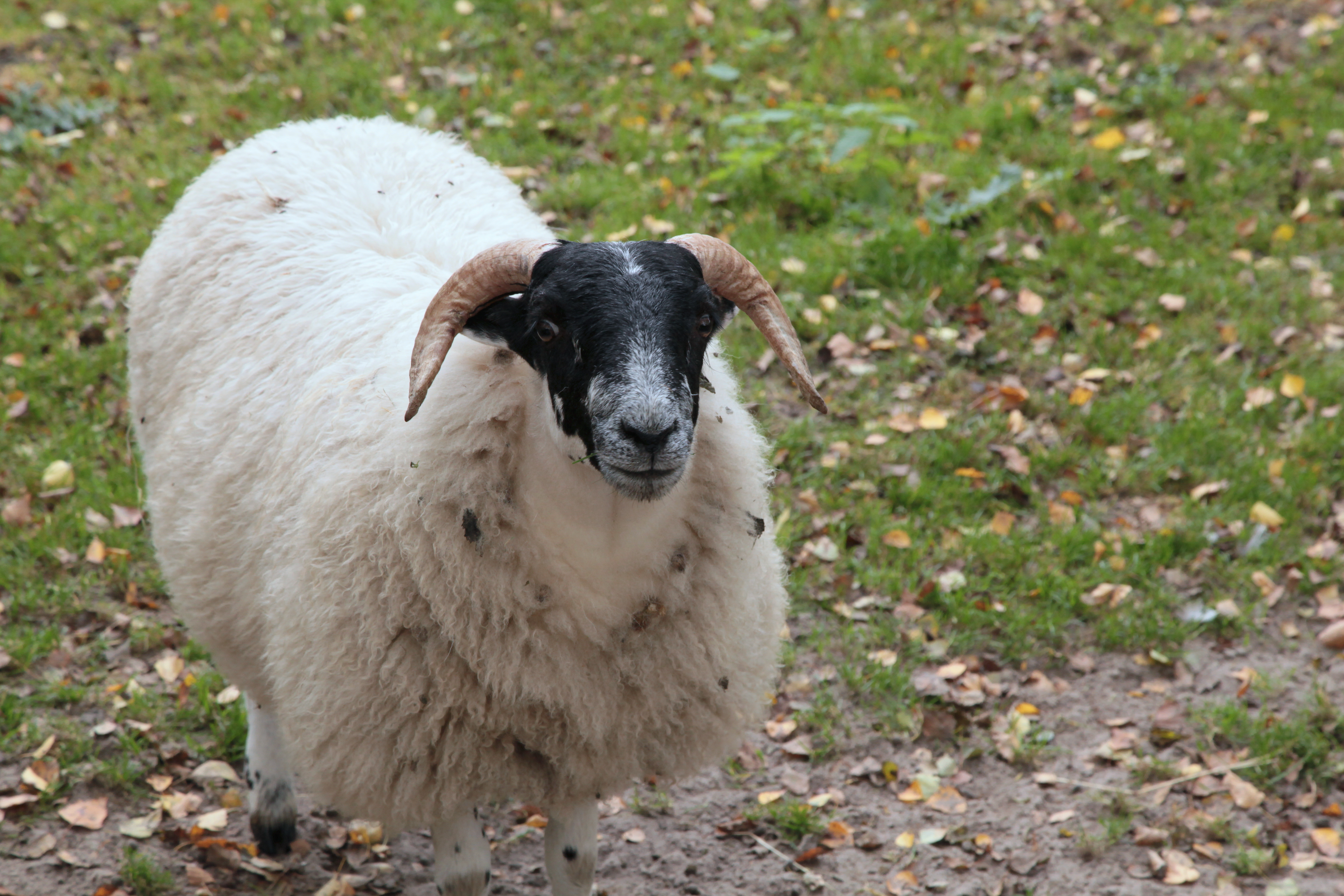 Scottish Blackface im Wildfreigehege Nöttler Berg in Saerbeck